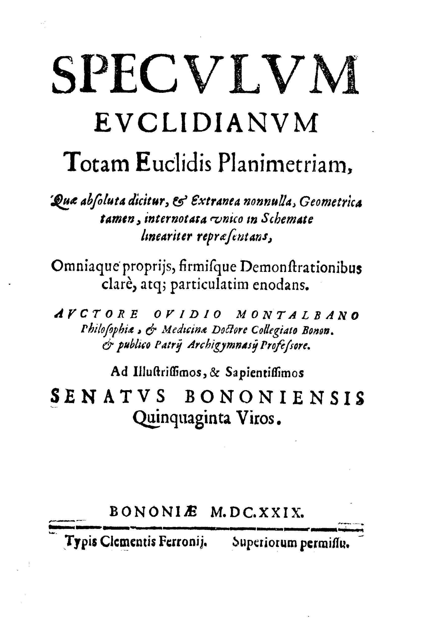 Speculum Euclidianum totam Euclidis planimetriam, quae absoluta dicitur, & extranea nonnulla, geometrica tamen, internotata vnico in schemate lineariter repraesentans, omniaque proprijs, firmisque demonstrationibus clare, atque particulatim enodans. Auctore Ouidio Montalbano .... - Bononiae : typis Clementis Ferronij, 1629. - [4], 90, [2] p., [1] c. di tav. : ill. calcogr. ; 4º .